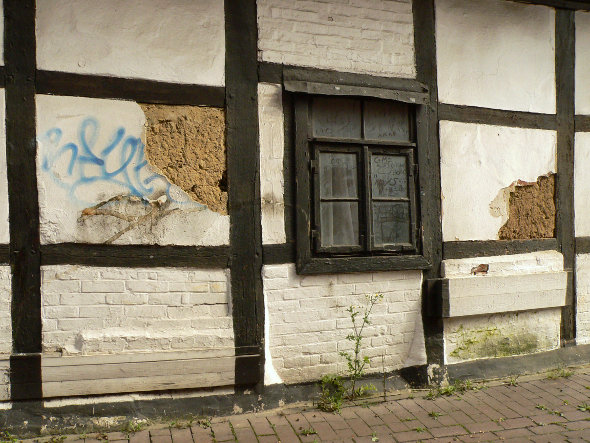 Köritzhof, Putzschäden am Altenteilerhaus